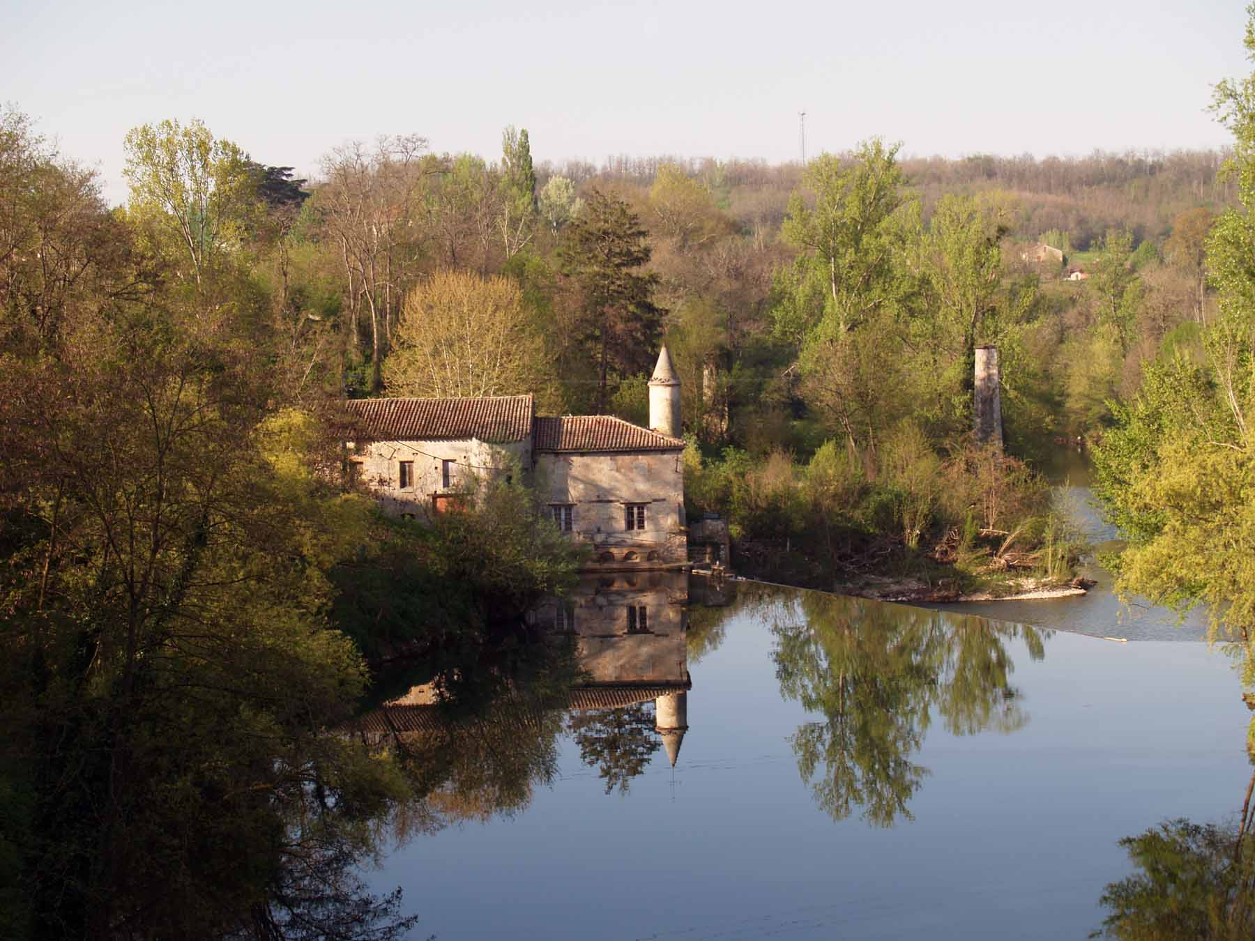 Le moulin de Briatexte (Tarn - France) sur le Dadou.